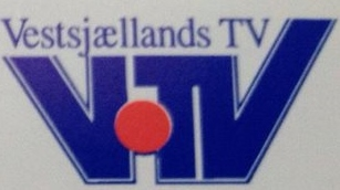 Logo for the former regional TV station VTV in Denmark